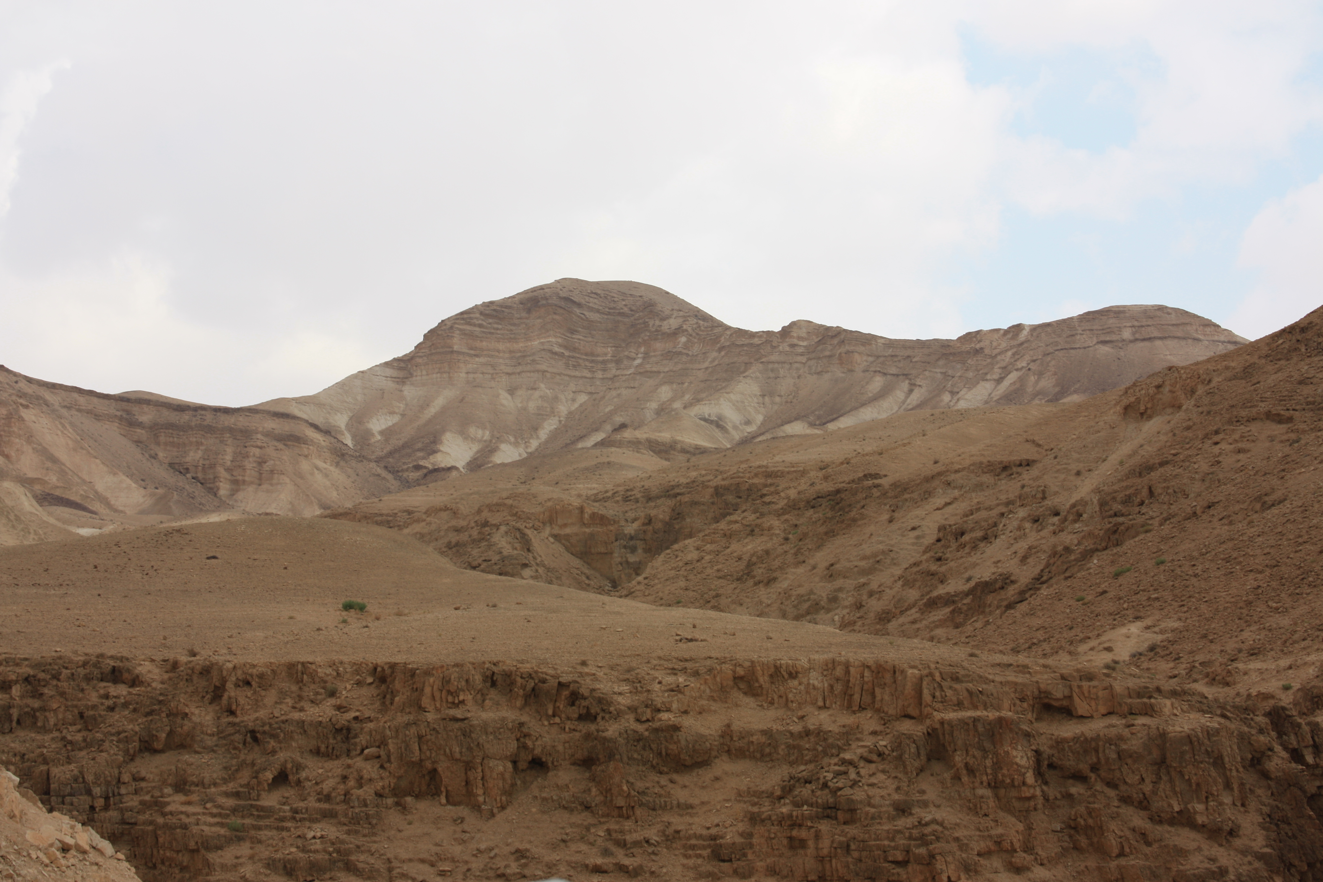 מצוק דרגות